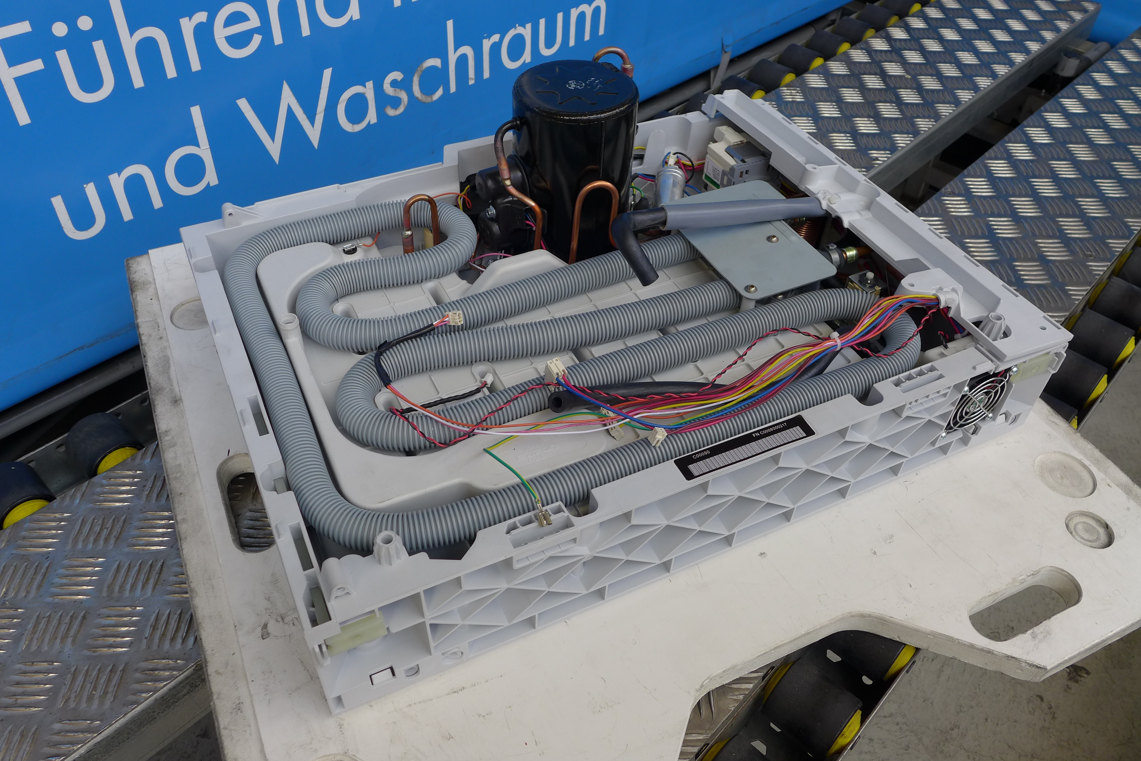 Wärmepumpenaggregat eines Geschirrspülers